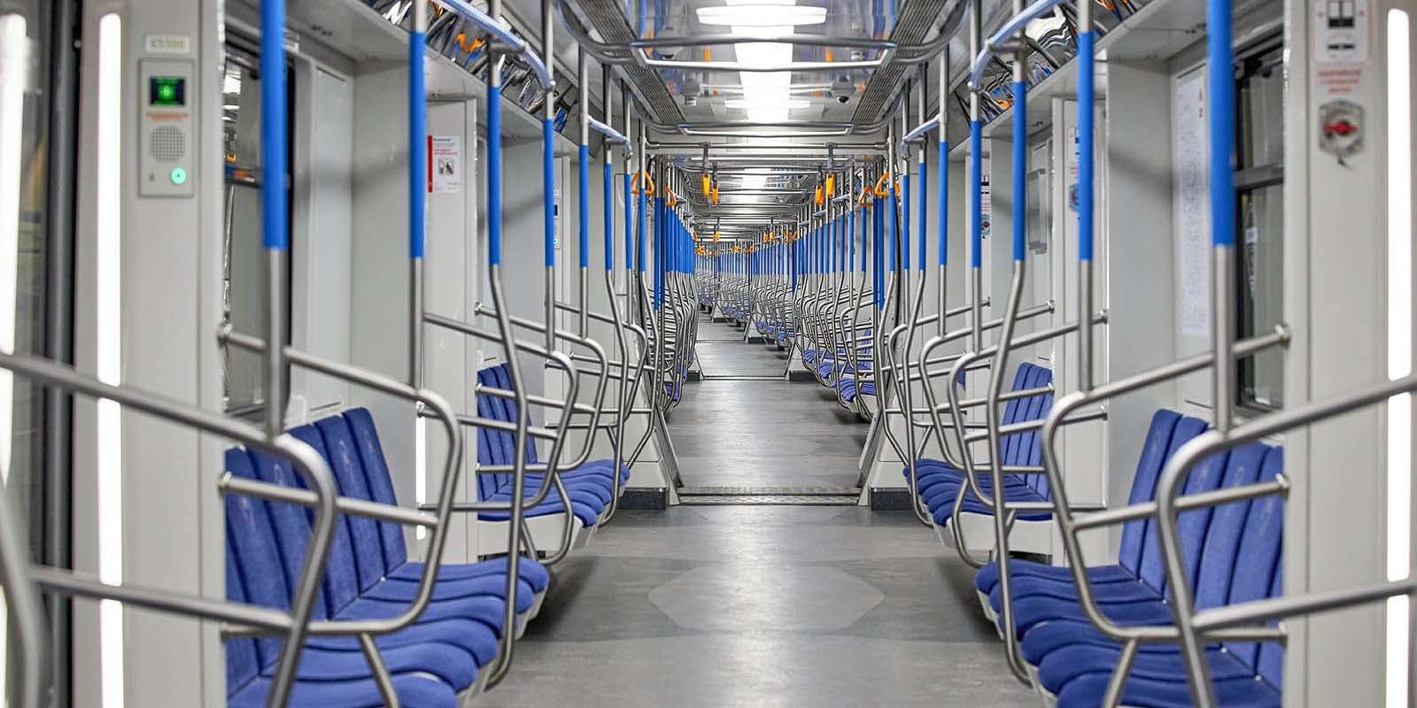 Интерьер салона